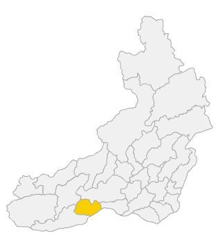 מיקום הנפה